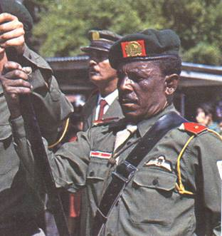 Adjudant Ormskerk op onafhankelijkheidsdag 25 nov 1975